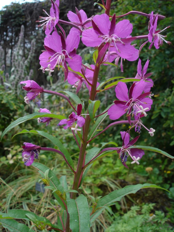 Epilobium angustifolium, Jardin des Plantes de Paris